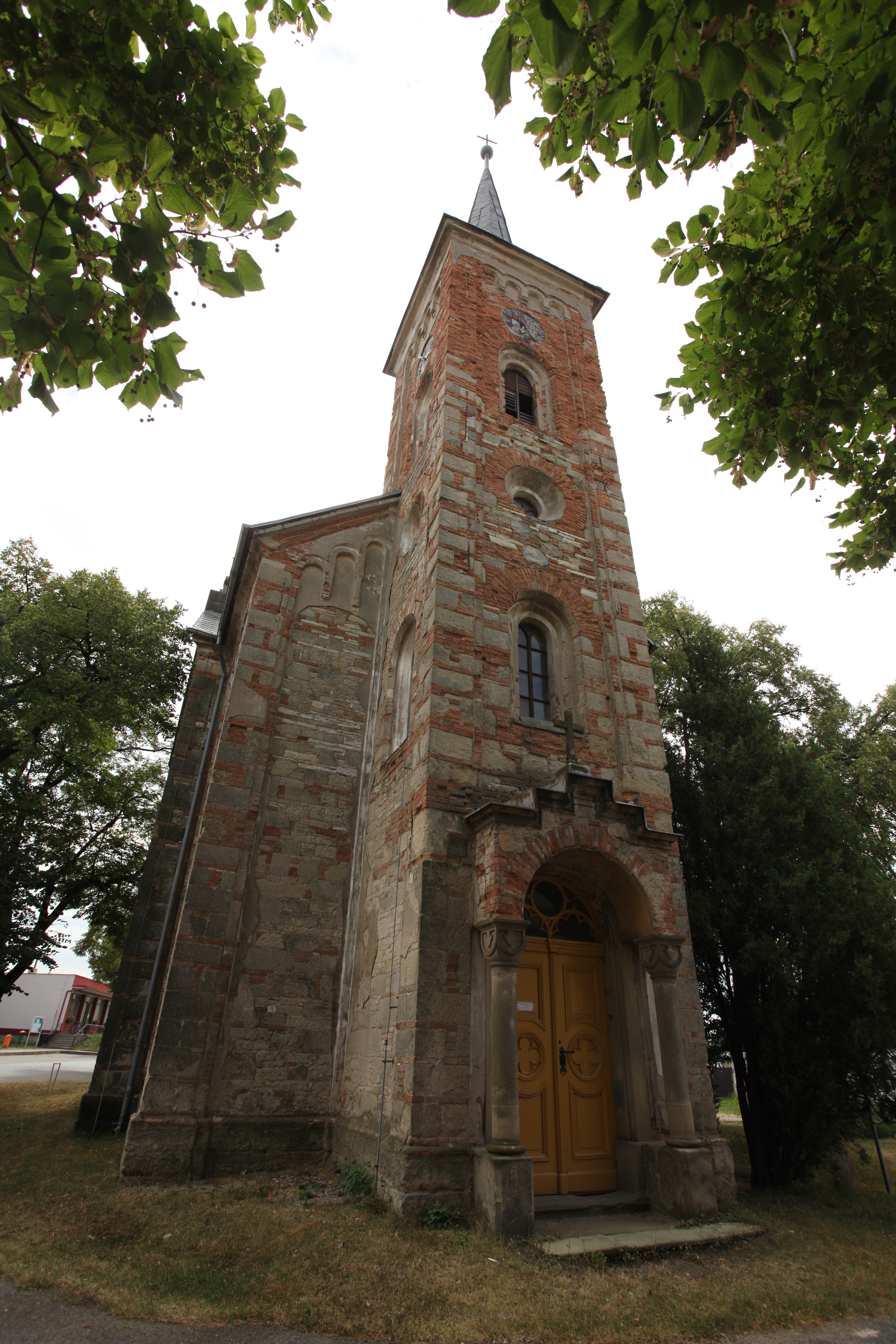 Horní Slivno, kostel sv. Martina